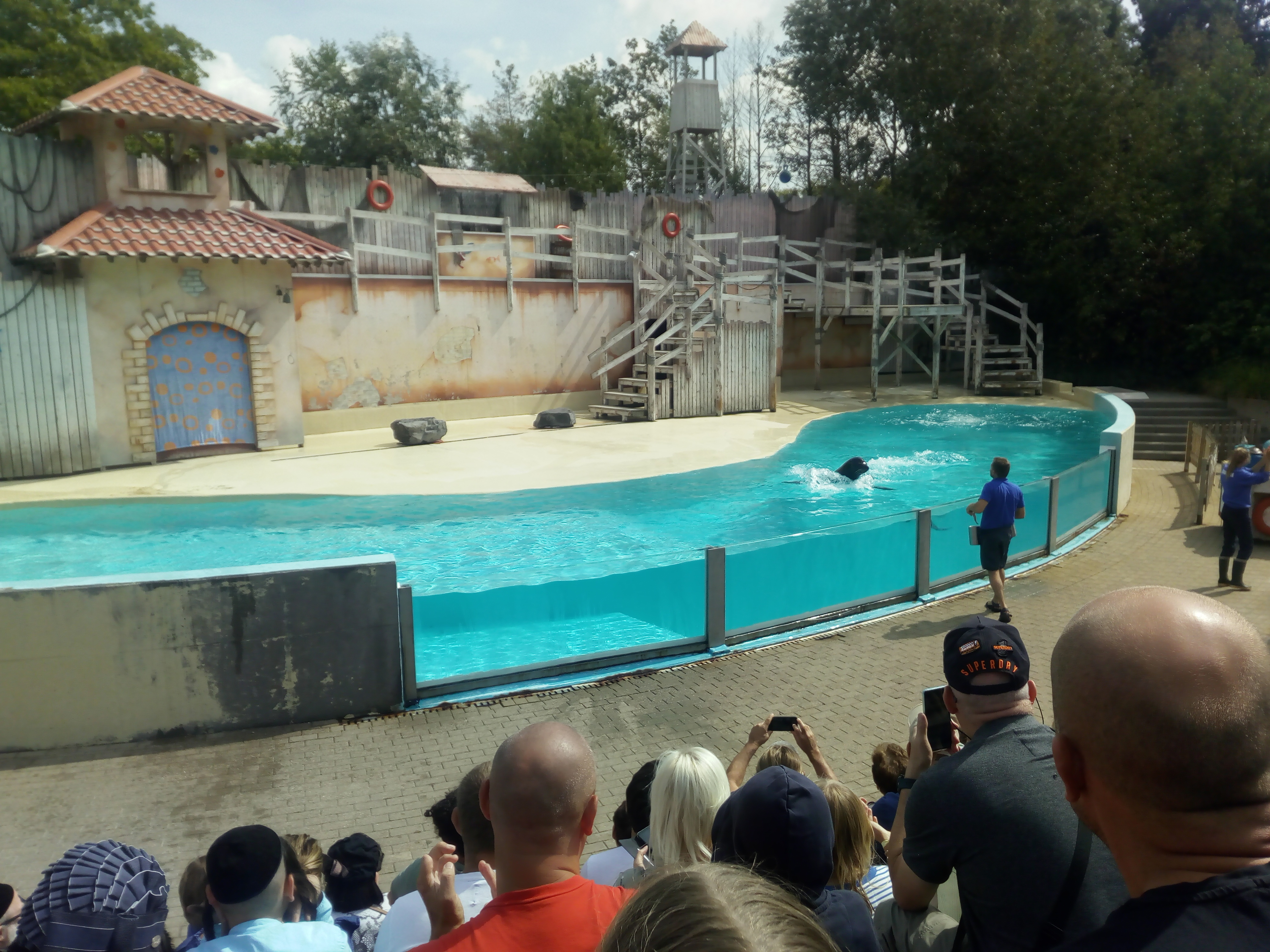 Zeeleeuwshow in het Boudewijnpark (Boudewijn Seapark)